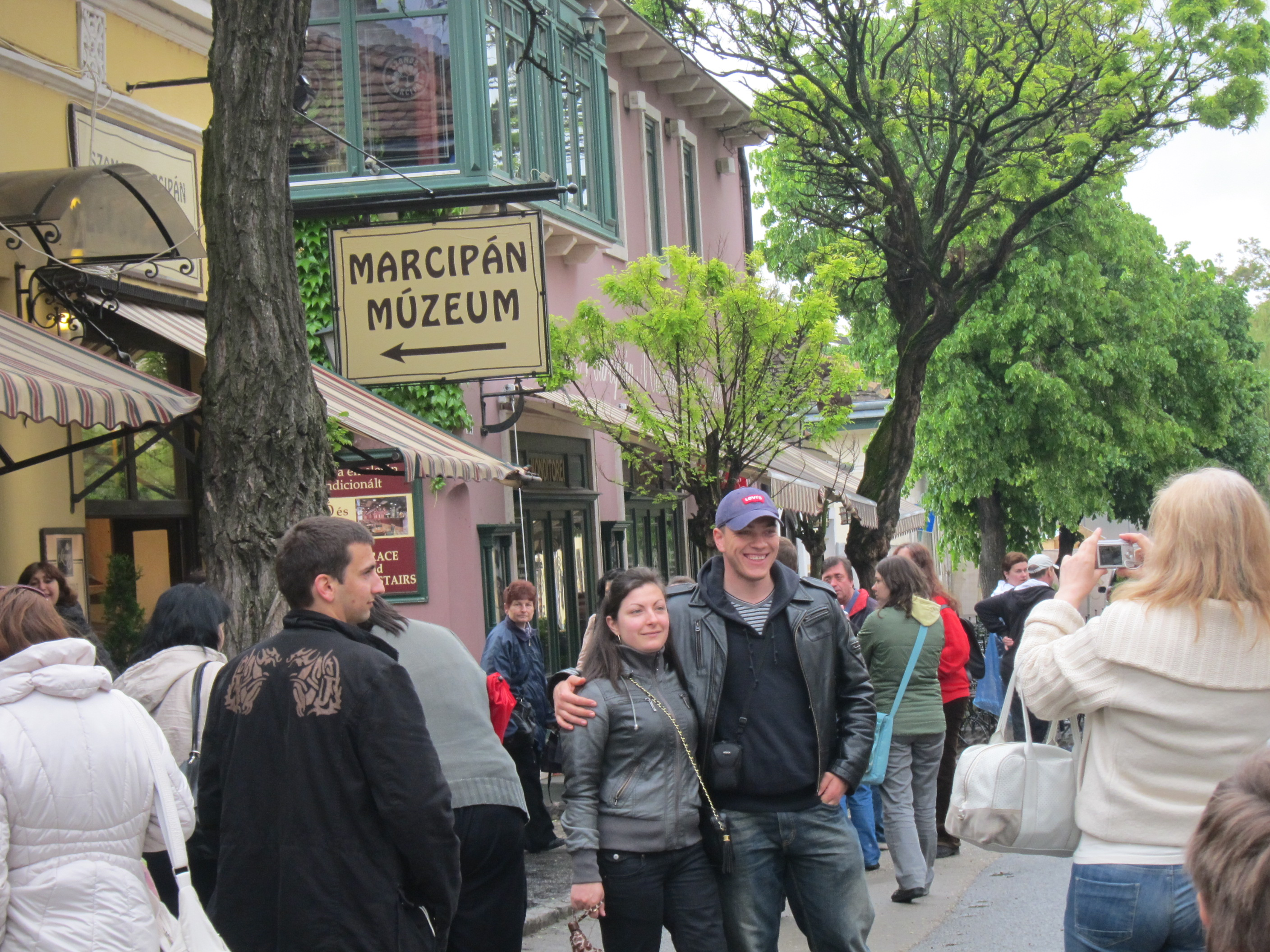 Музей на марципана в Унгария